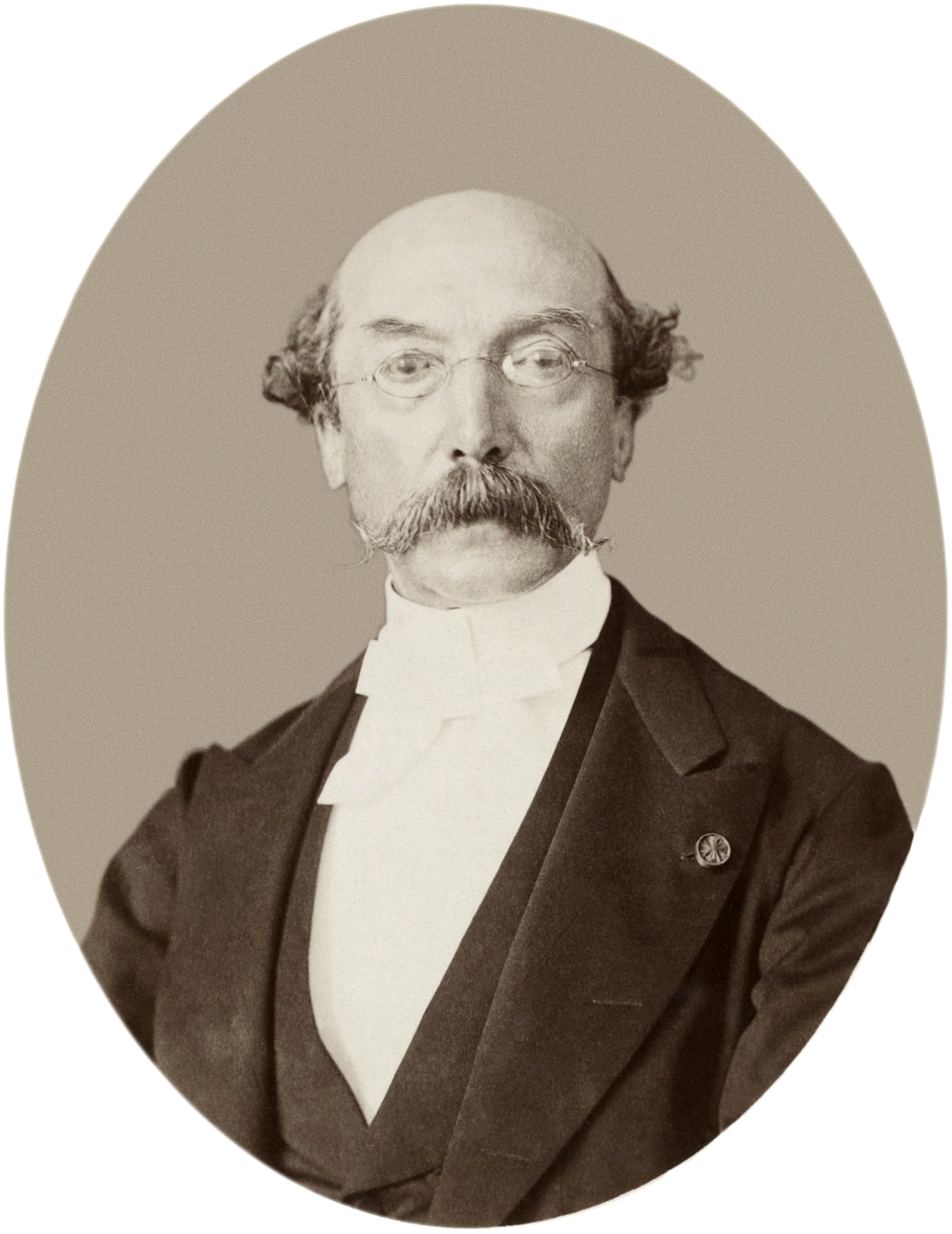 Jean-Baptiste Liagre (1815 - 1891), général belge, qui fut ministre de la Guerre.